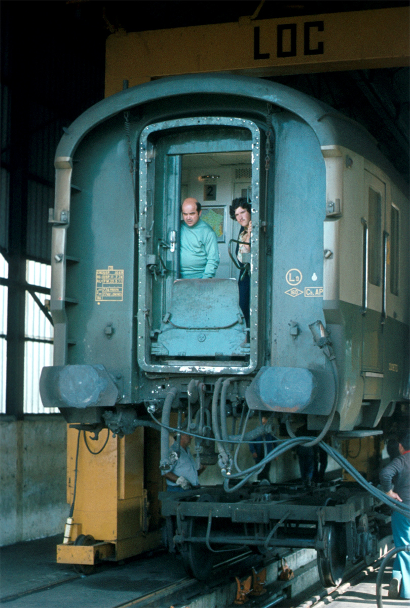 De doorgaande rijtuigen hangen hier in de hefinrichting op 28 september 1977 te Hendaye, Frans grensstation bij Spanje. Hierbij worden de Spaanse breedspoordraaistellen door de Franse normaalspoordraaistellen vanaf de Franse zijde terug gedrukt met een speciale locomotief. Na de introductie van een TGV dienst tussen Parijs en Hendaye in 1994 zijn de treinen die van de hefinrichting gebruik maakten opgeheven (Puerta del Sol) of ingekort (Sud Express), de hefinrichting is inmiddels afgebroken.